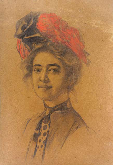 Elena Popea - Autoportret, cărbune şi tempera, 65/42,5 cm, Muzeul de Artă Cluj-Napoca - nr. inv. 6128